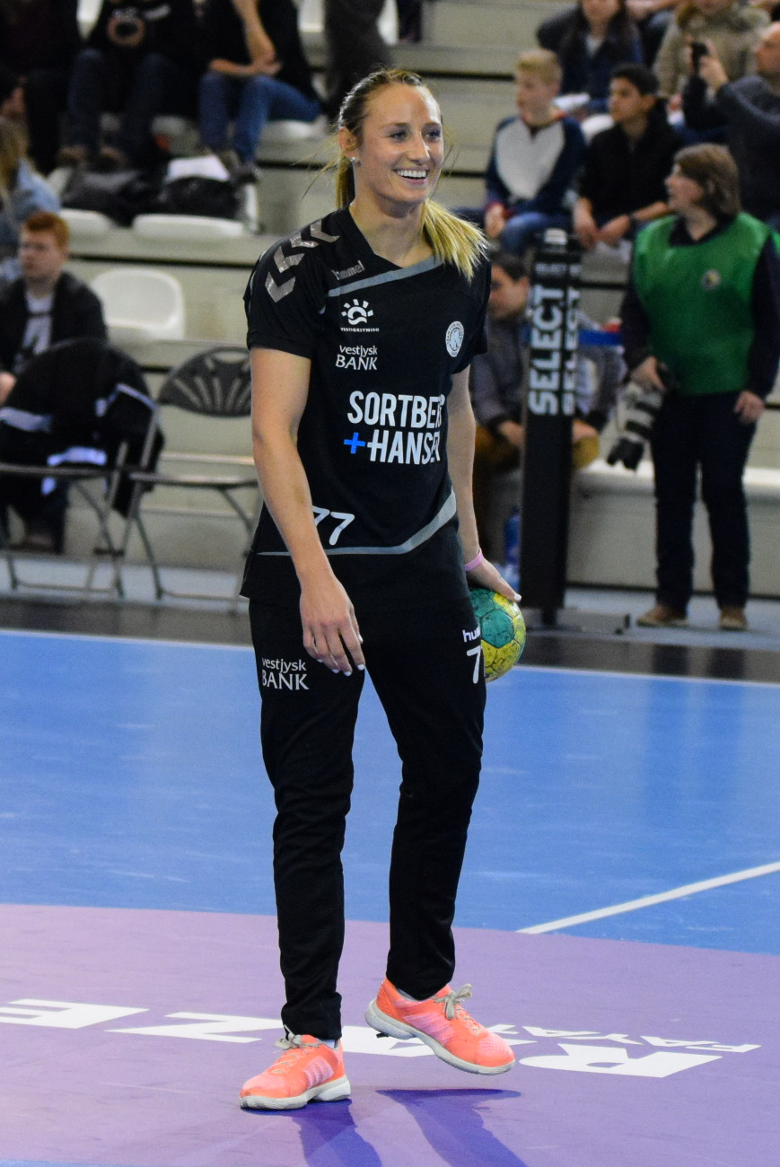 Camilla Herrem Le 03 avril 2016 lors du match aller de demi-finale de la Coupe des vainqueurs de coupe de handball Issy Paris Hand / Team Tvis Holstebro